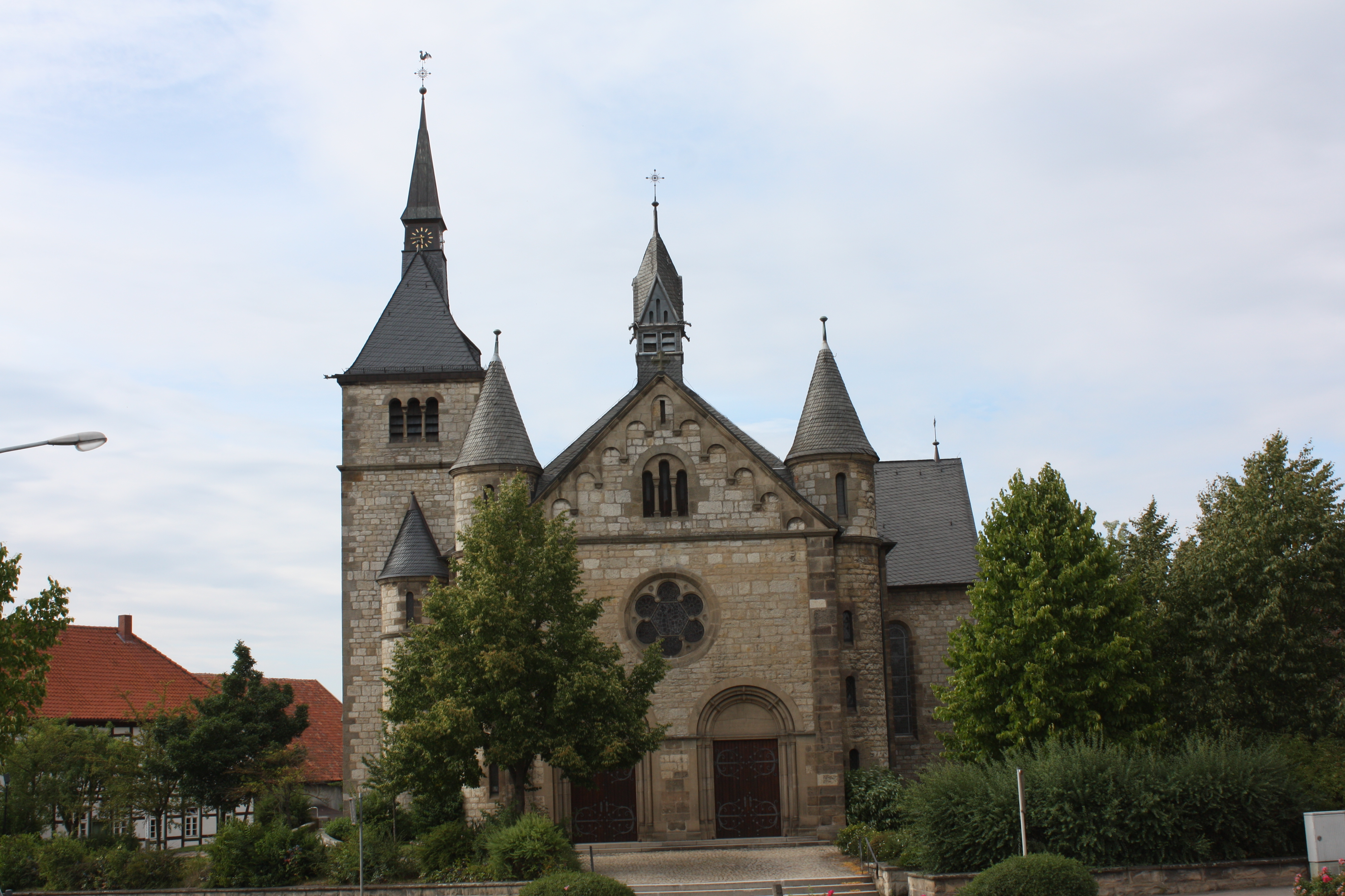 katholische St. Johannes Enth.-Kirche in Warburg-Ossendorf